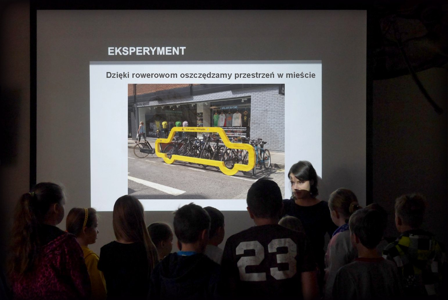 Zajęcia edukacyjne w szkołach w ramach projektu Akademia Rowerowa (SP77 w Poznaniu)